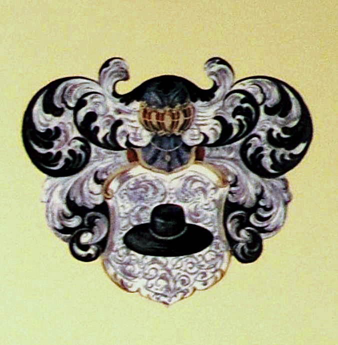 Wappen der italienischen Familie Capellini. Das redende Wappen der Familie Capellini zeigt einen schwarzen Hut mit breiter Krempe. Der Familienname leitet sich von cappello (italienisch = Hut) ab.